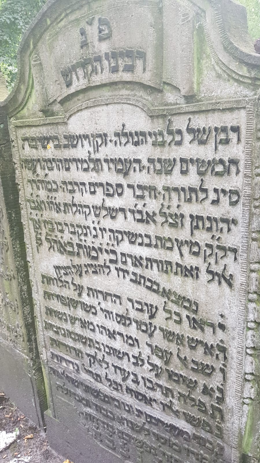 המצבה על קברו של יהונתן אייבשיץ, 6 באוגוסט 2019